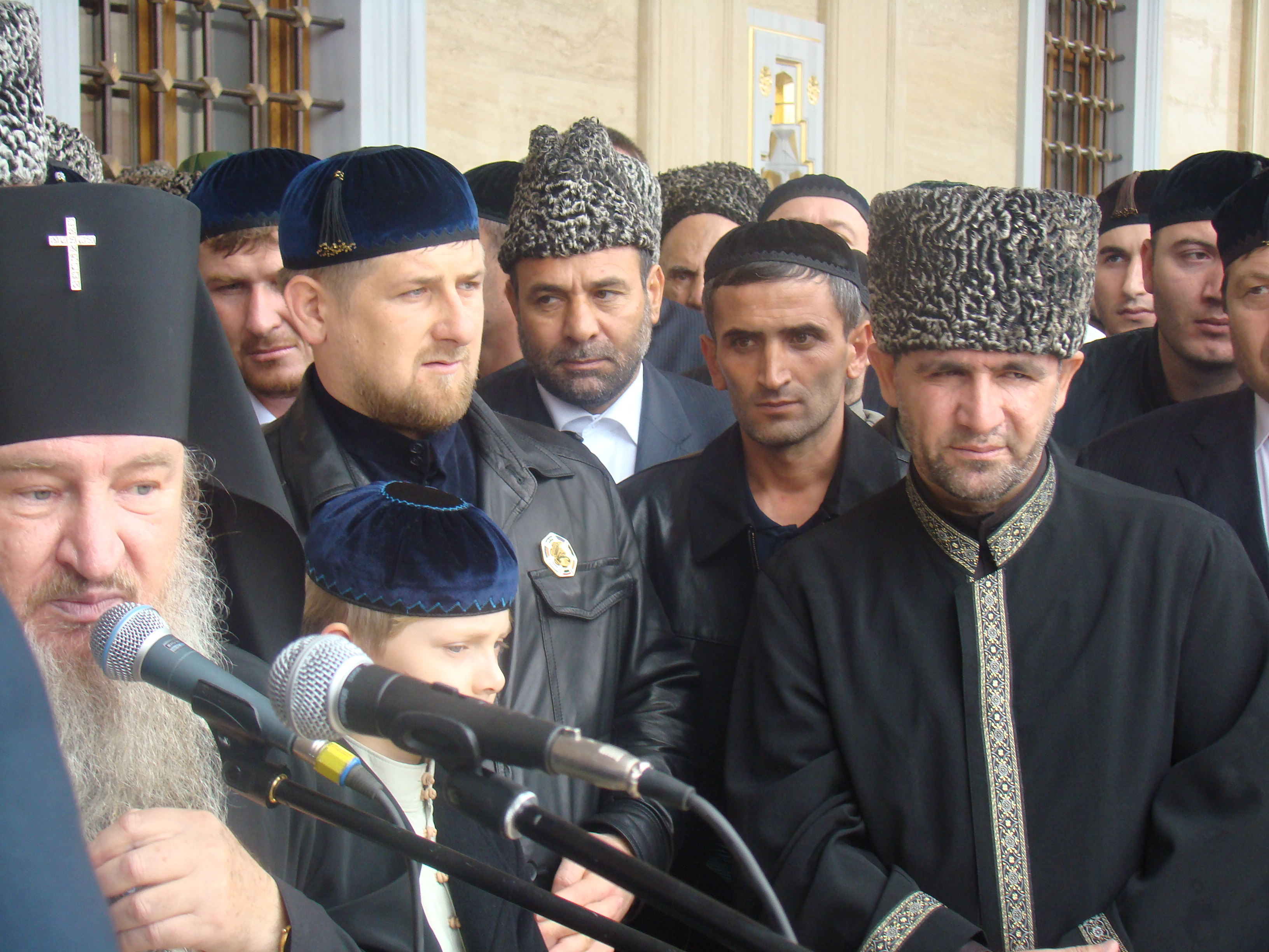 Sie dürfen das Foto mit Nennung des Autors honorarfrei vervielfältigen, verbreiten und öffentlich zugänglich machen. Foto: RMT /